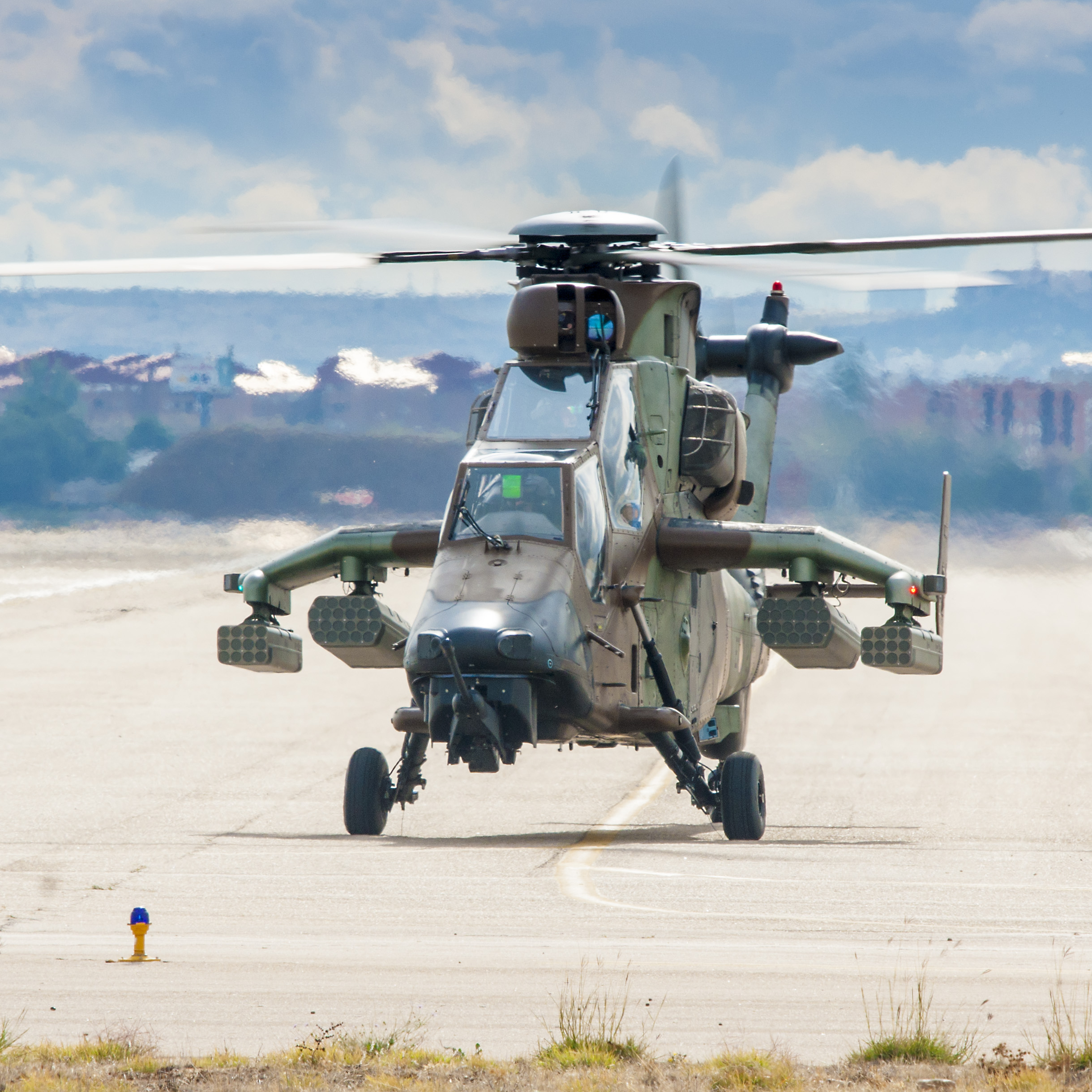 Aire75 Airshow 75 aniversario del Ejercito del Aire